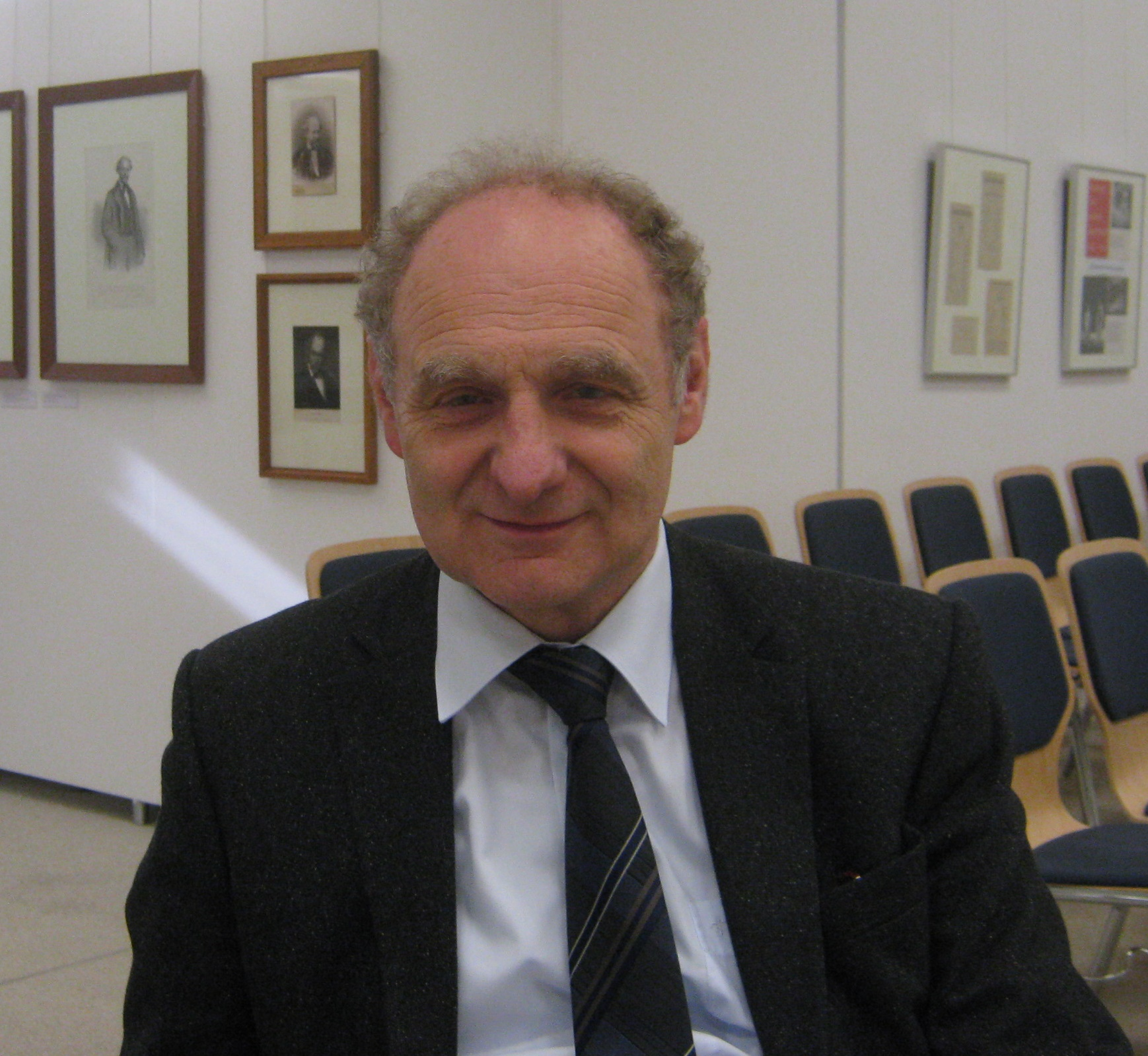 Fotografie von Dr. phil. Jens Ahlers